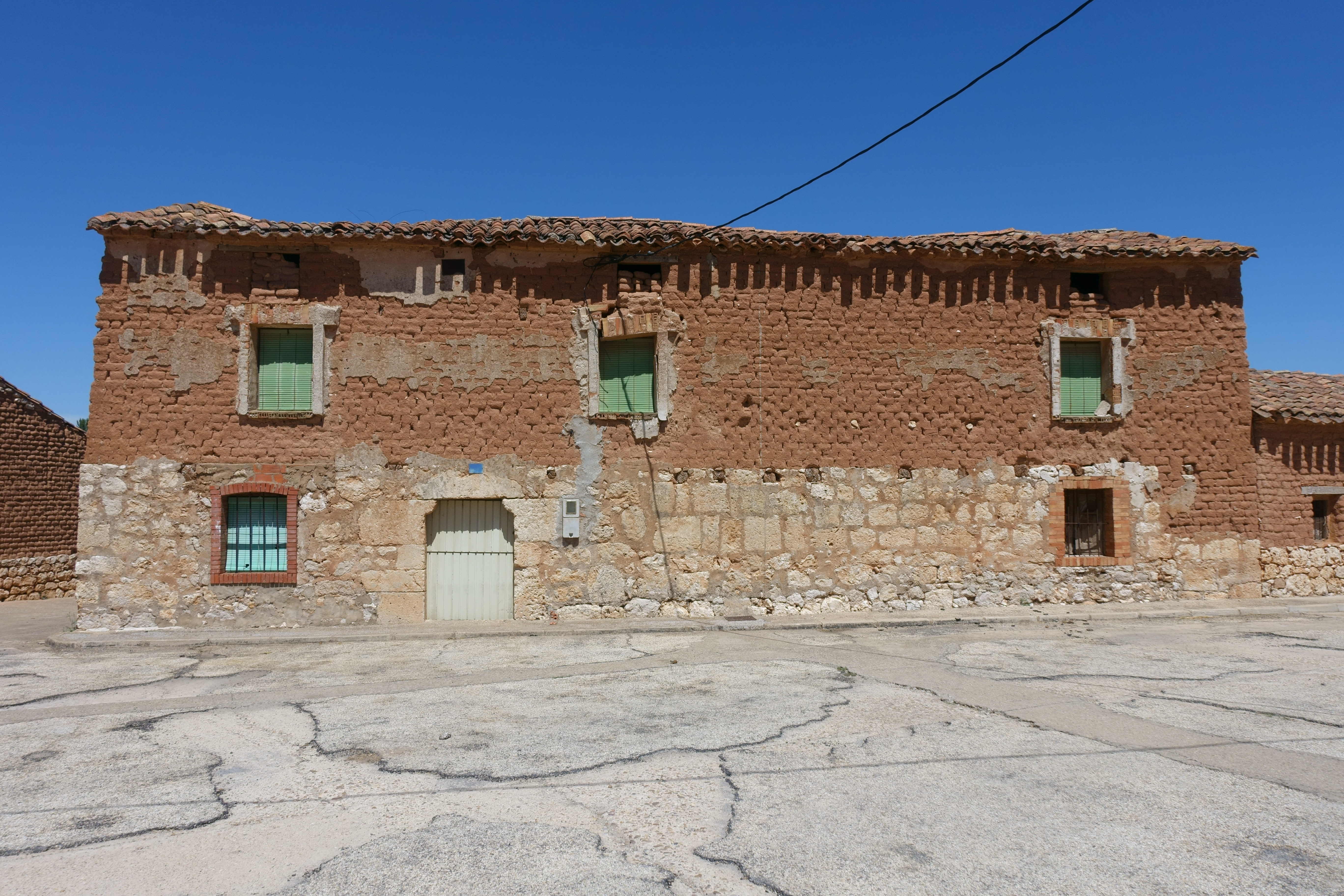 Arquitectura tradicional en Torrepadre (Burgos, España).